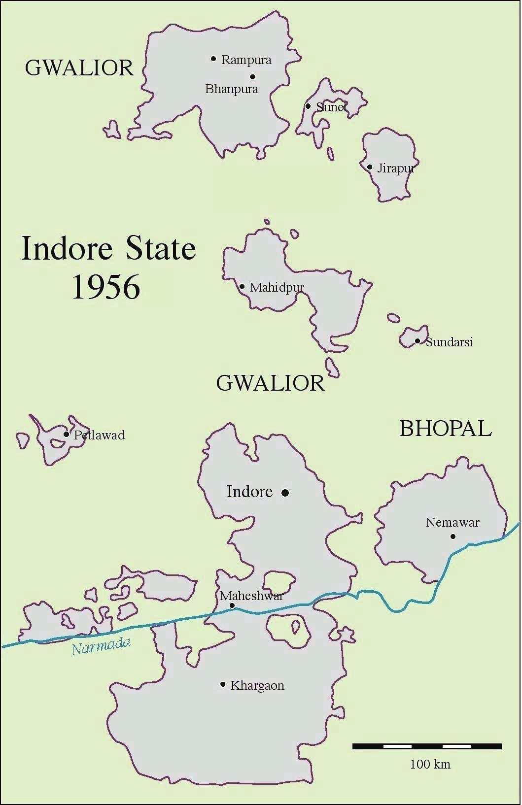 Karte von Indore